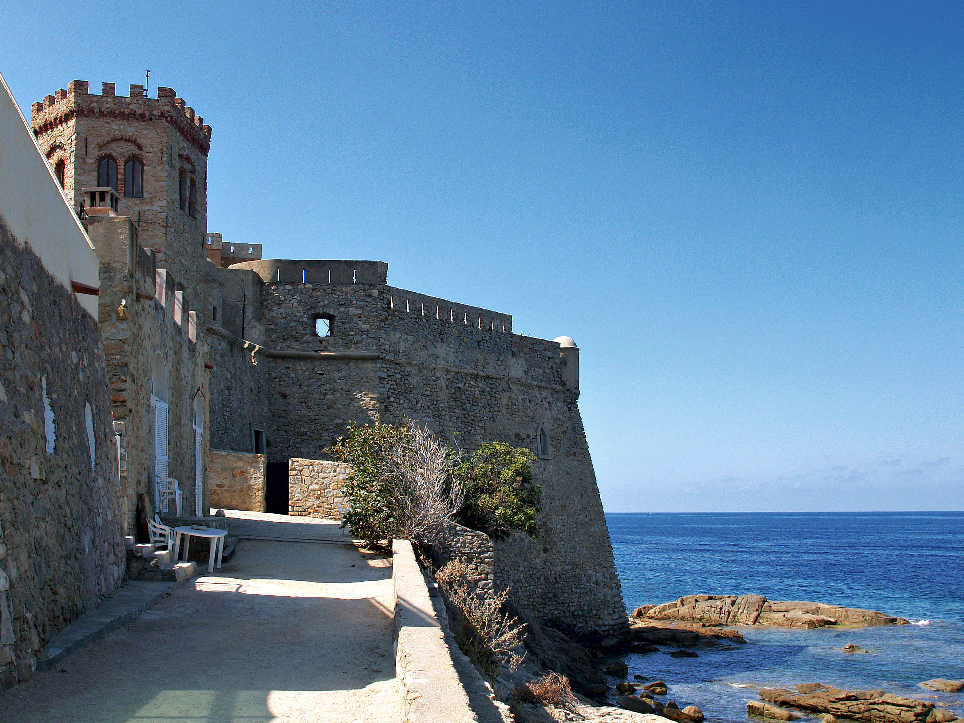 Algajola - La citadelle